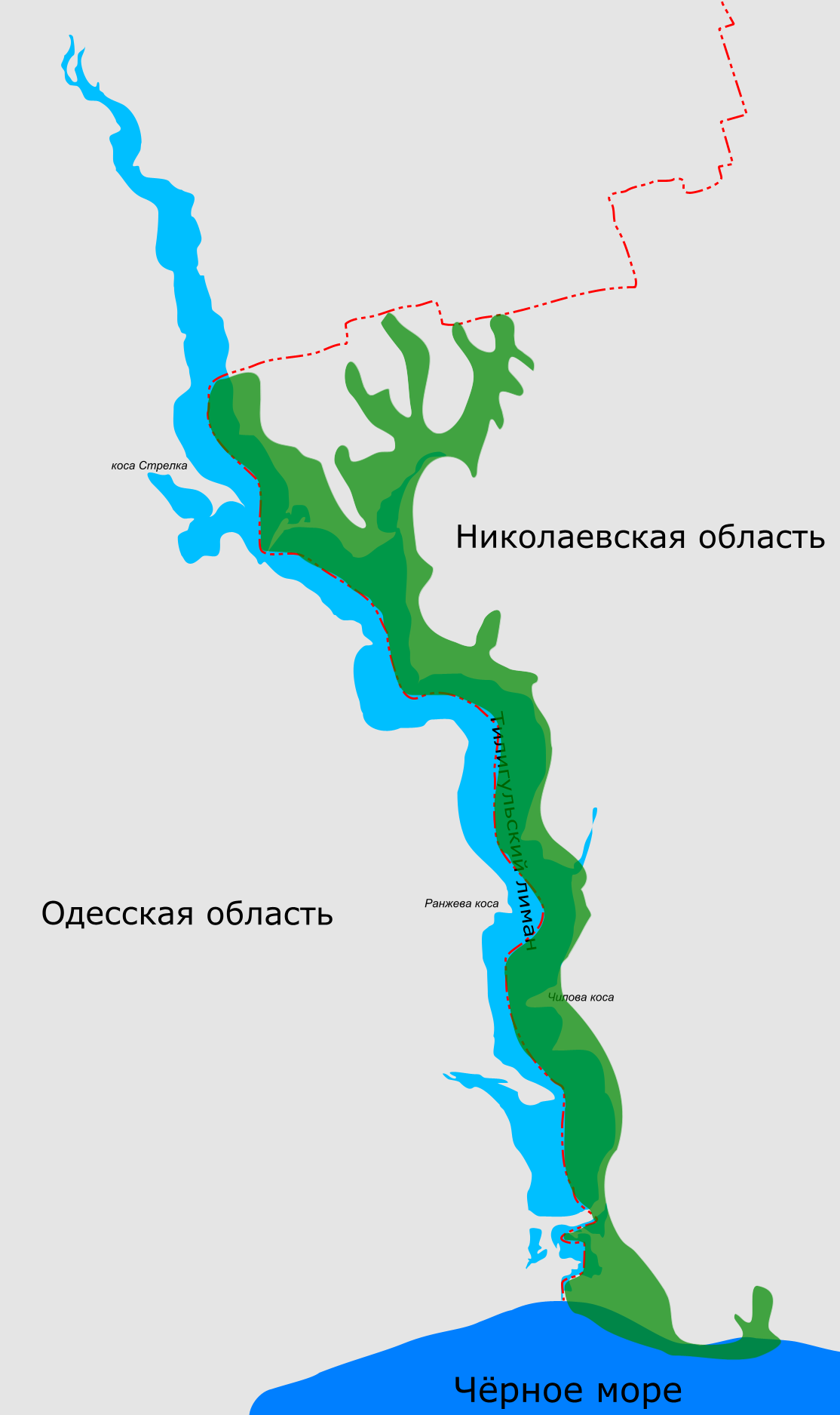 Tiligul park in Nikolaevsaya oblast